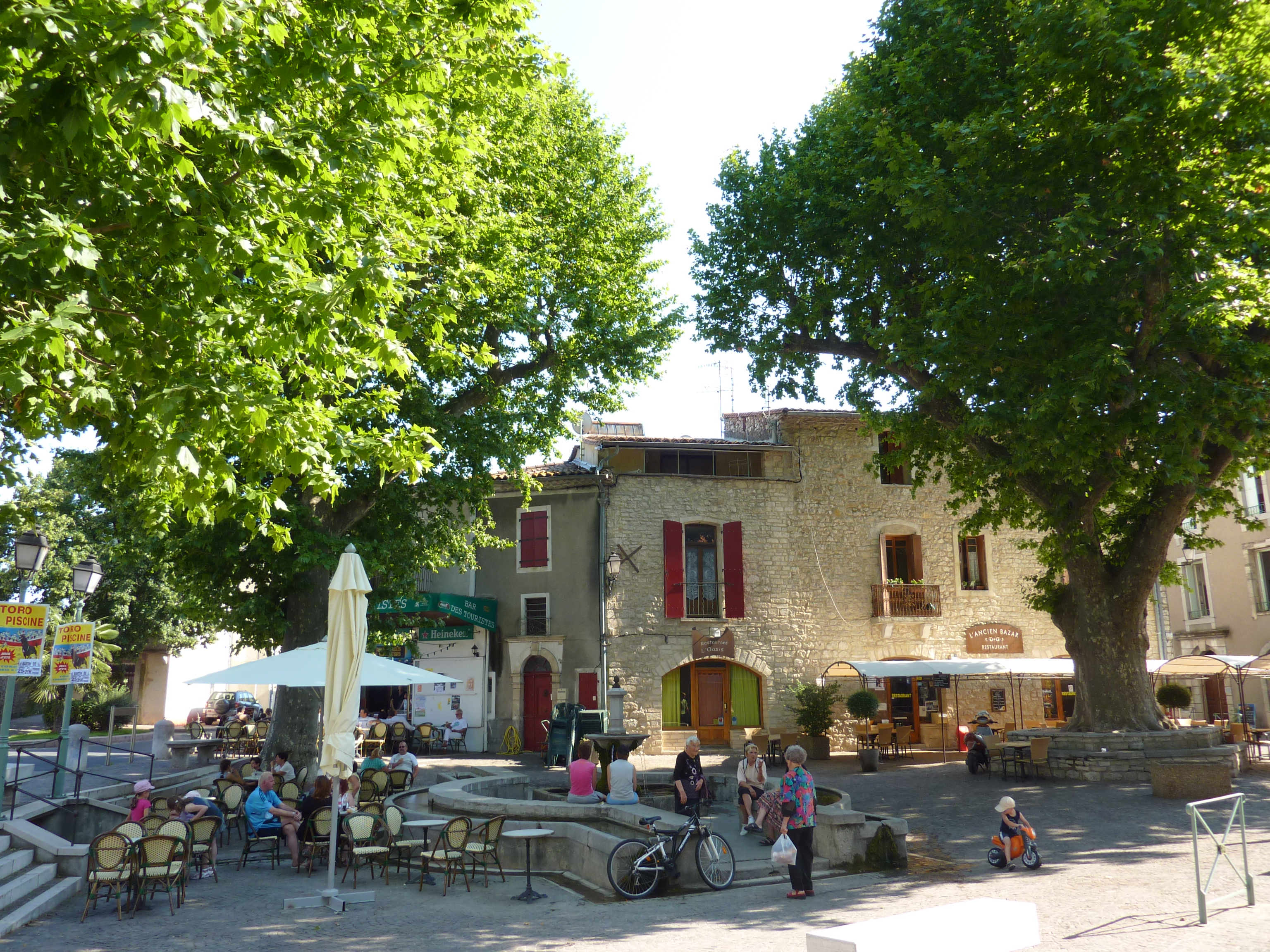 Saint-Martin-de-Londres (Hérault, Languedoc-Roussillon, France) : la Place de la Fontaine.